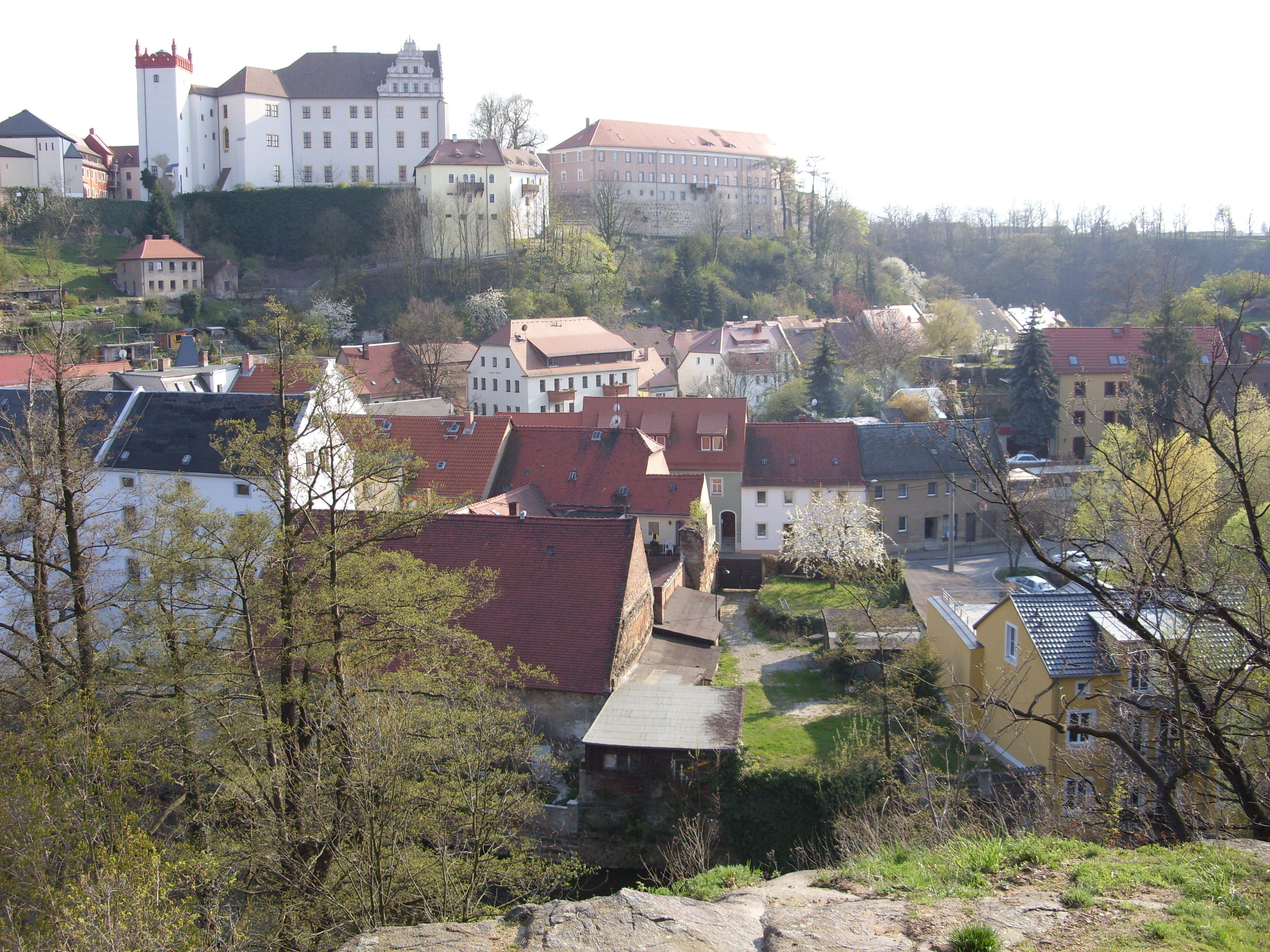 Ortenburg und ein Teil der Seidau in Bautzen; Ansicht vom Schützenplatz.